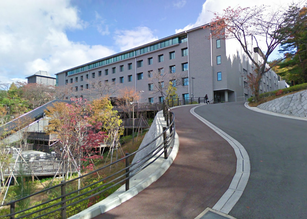 京都産業大学12号館